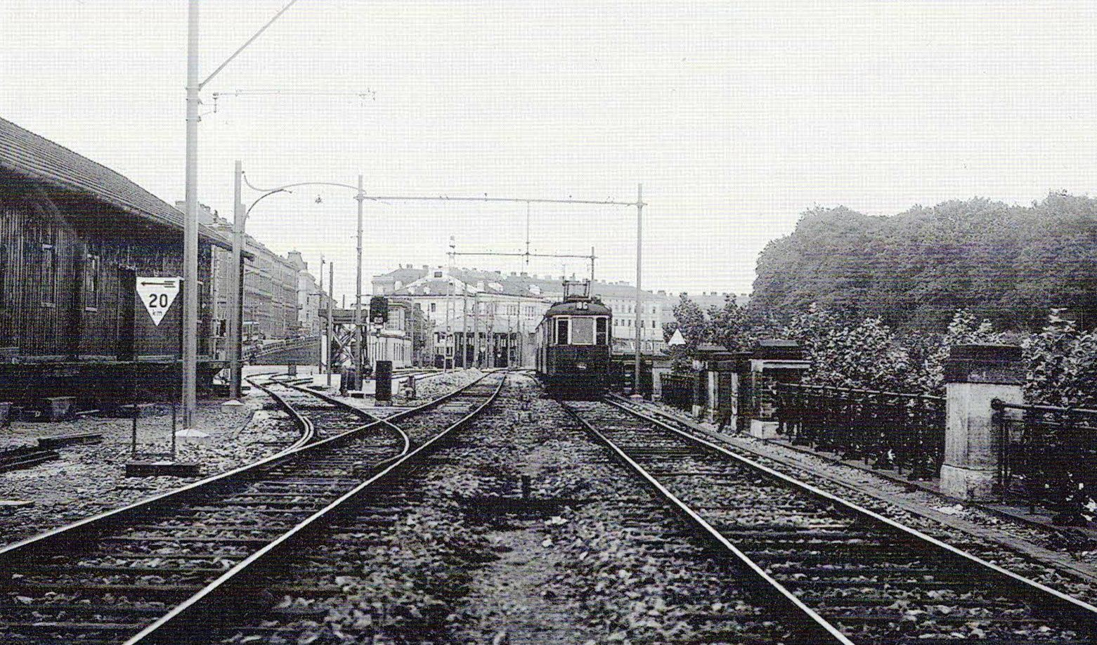 Einfahrt Michelbeuren 1927